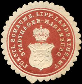 Sealing stamp Title: Fürstlich Schaumburg Lippische Landrathsamt - Stadthagen - Hagenburg Description: braun, weiß, geprägt Place: size: 4 cm